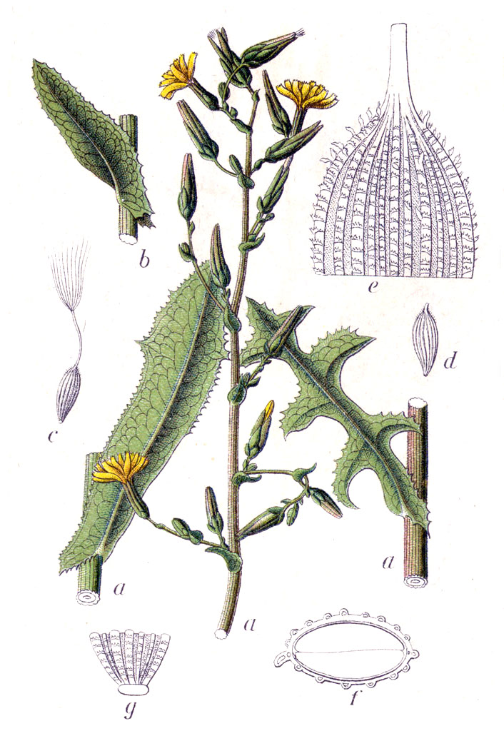 Lactuca serriola L., syn. Lactuca scariola L. Original Caption Echter Lattich, Lactuca scariola